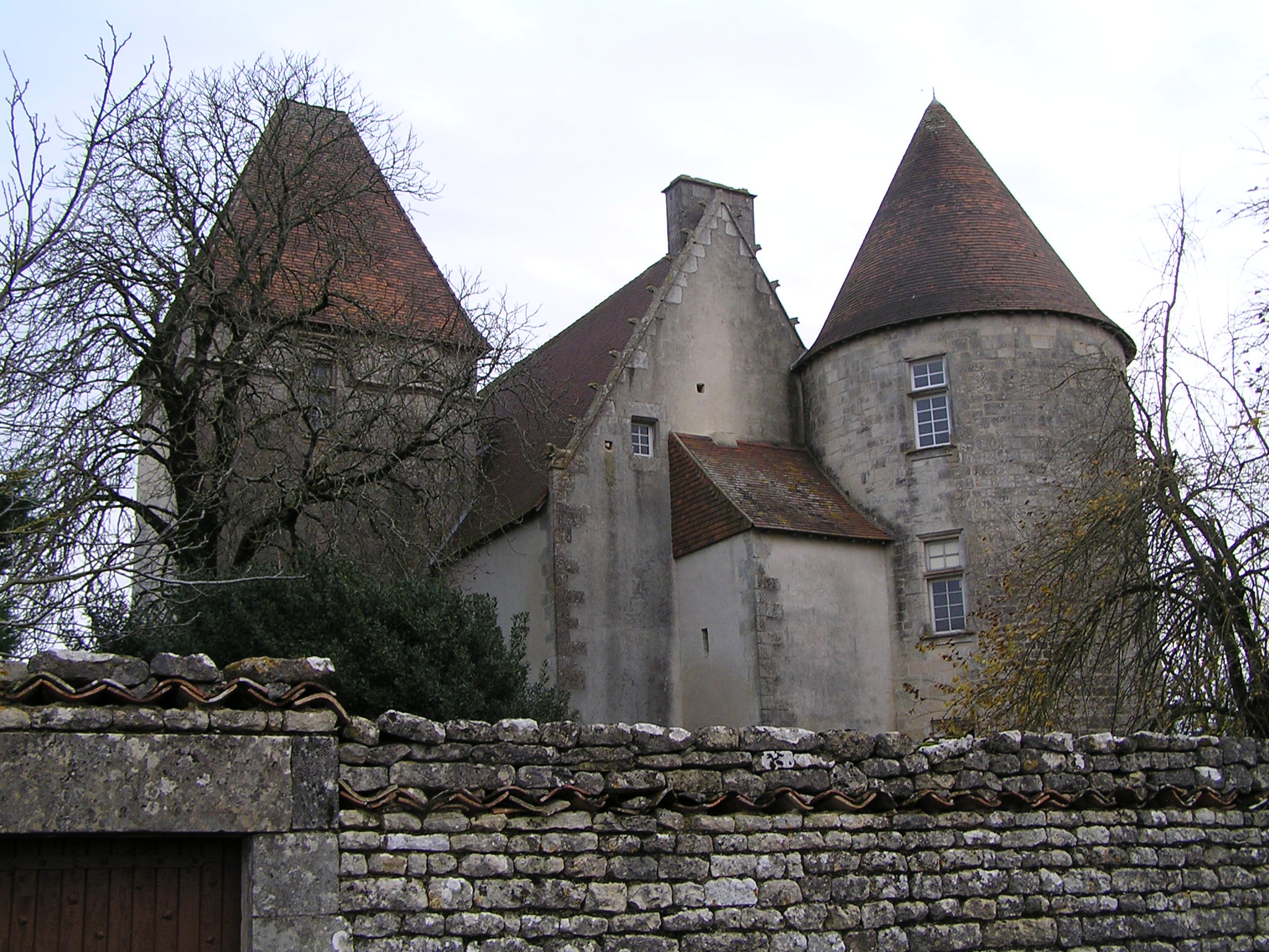 château de Barbezières, Charente, France